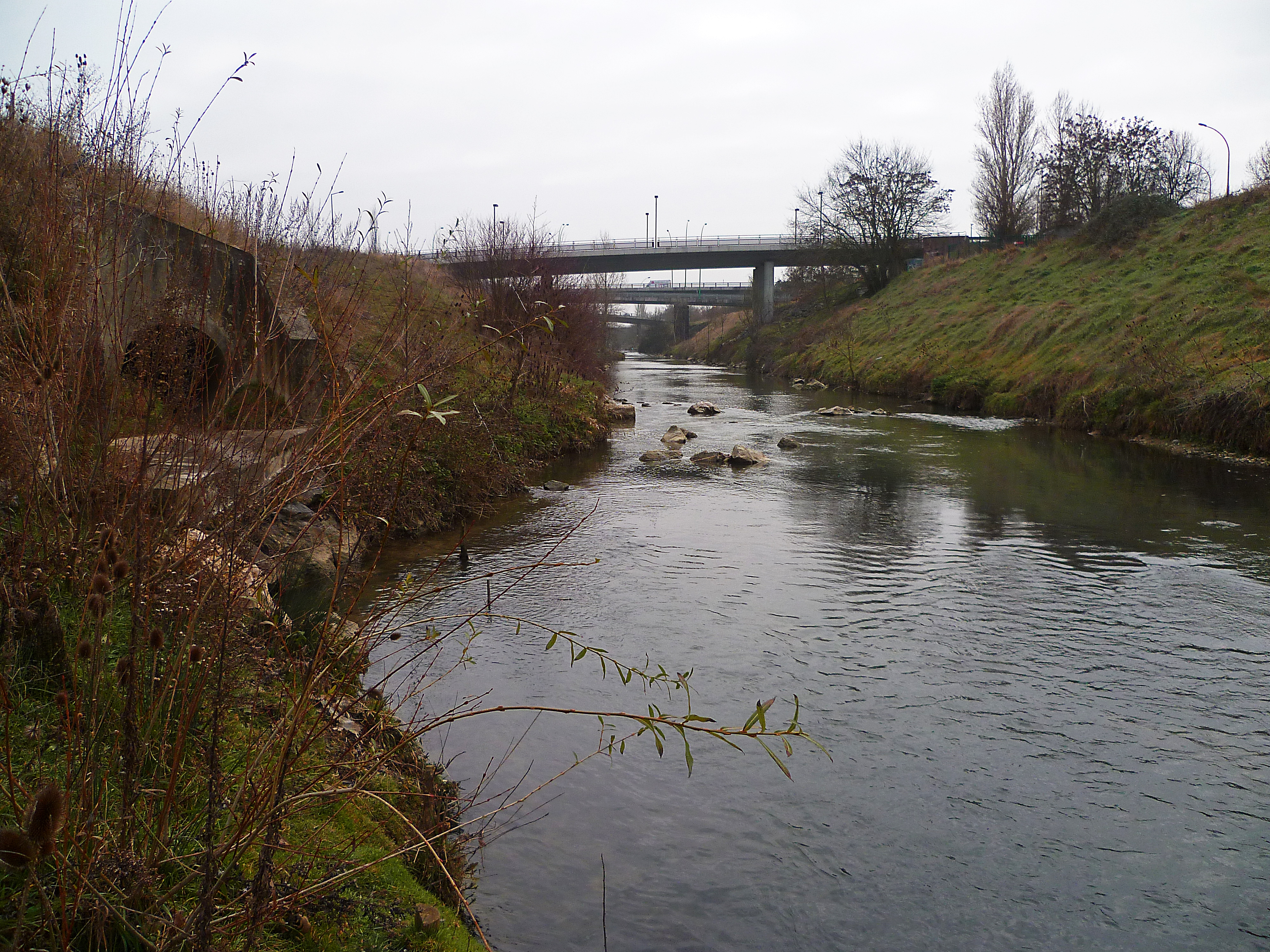 Toulouse (Haute-Garonne, Midi-Pyrénées, France) : L'Hers-Mort vu depuis Toulouse.